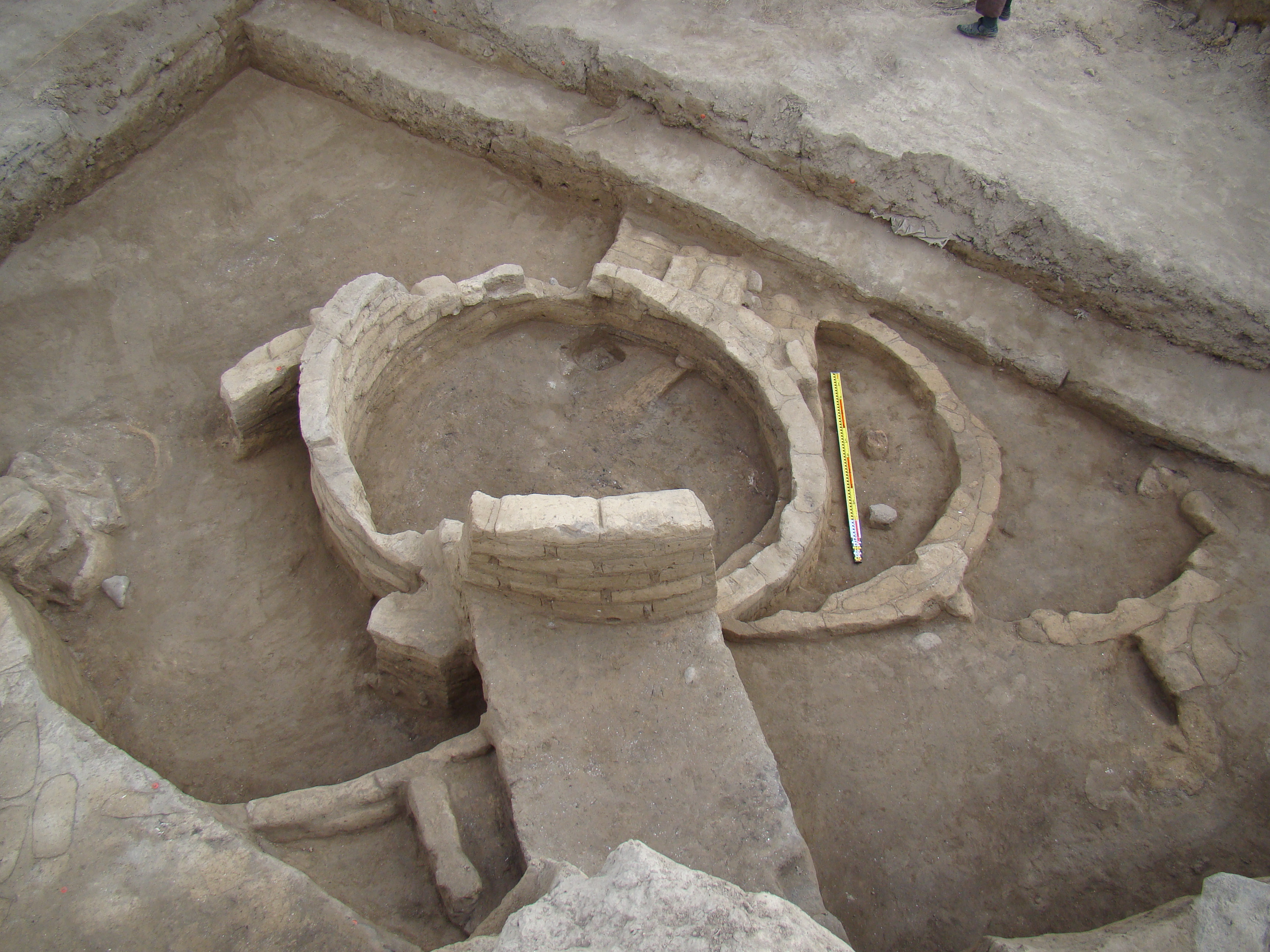 Tikili qalığı